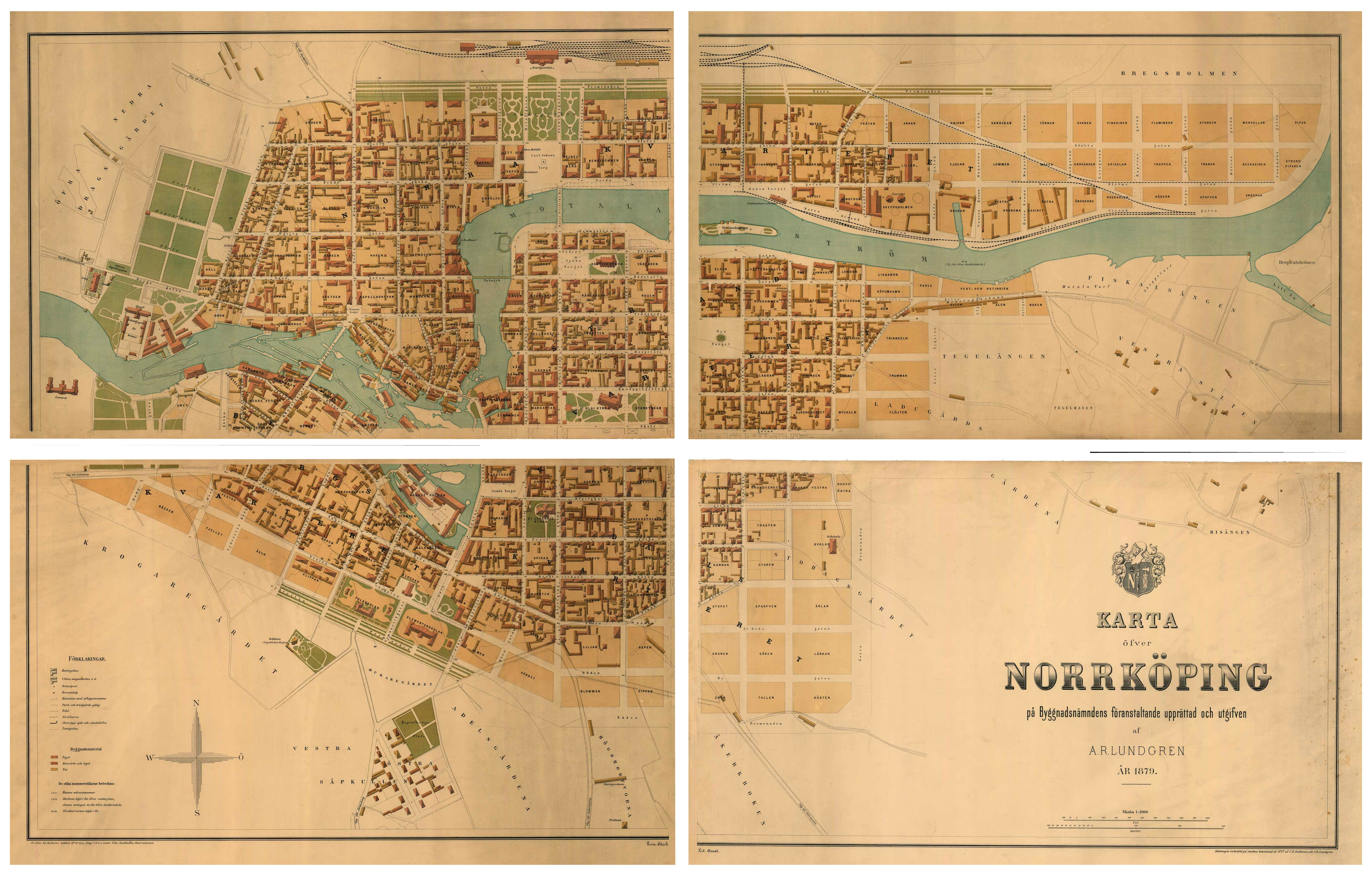 Karta över Norrköping av Alfred Rudolf Lundgren